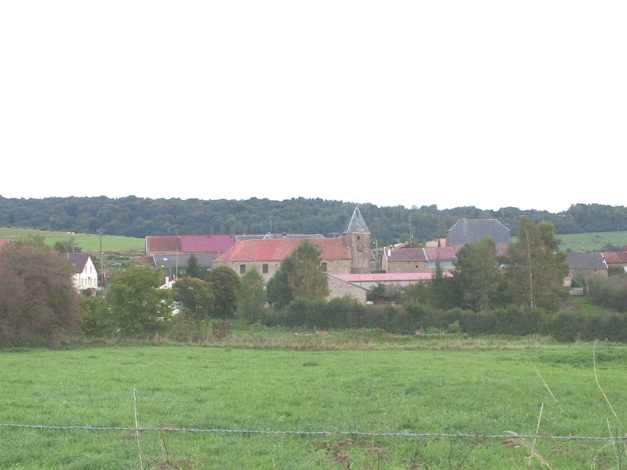 Chauvency-St-Hubert, vue du village depuis la route de Nepvant Photo prise par F5ZV en automne 2005